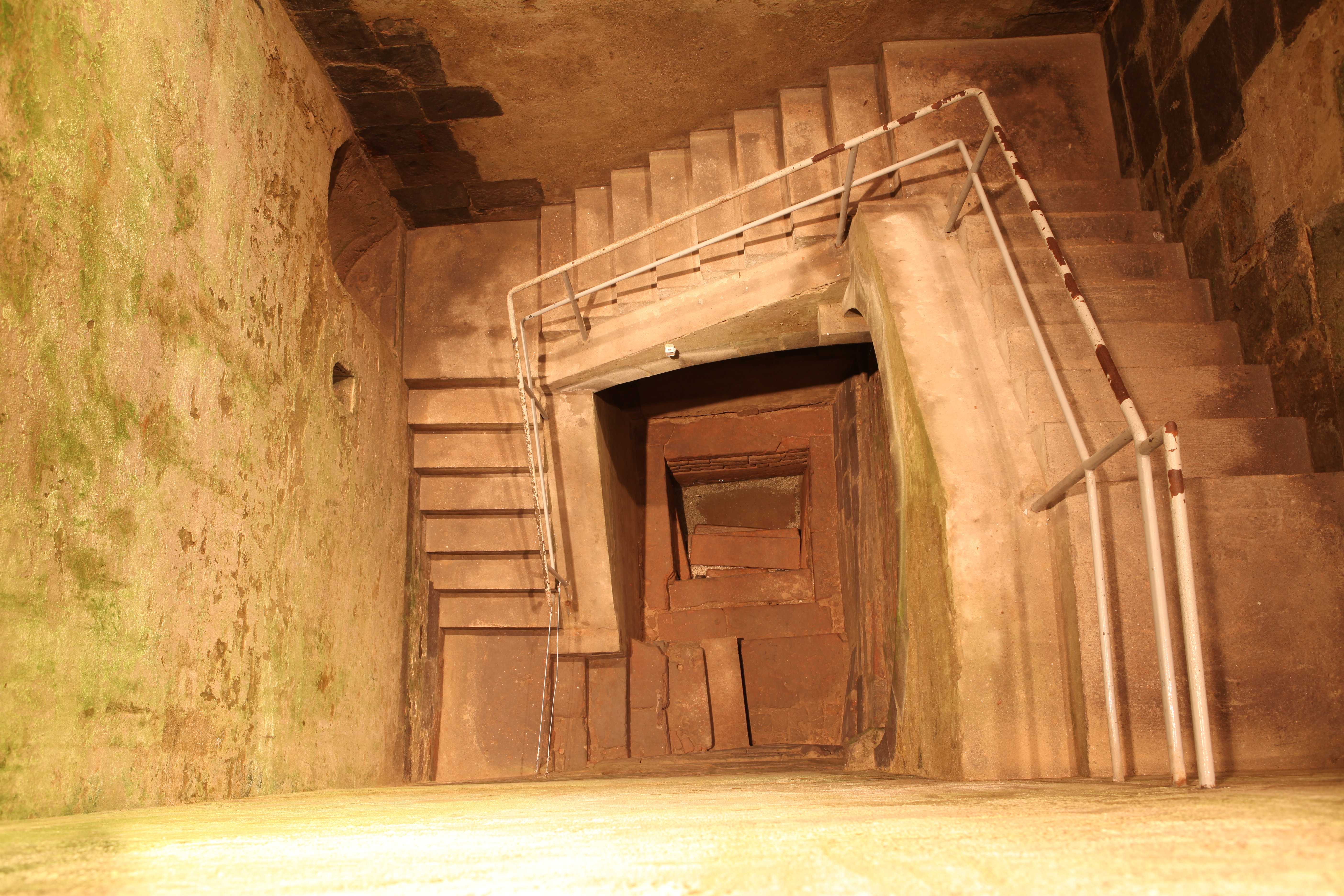 Die Mikwe von oben